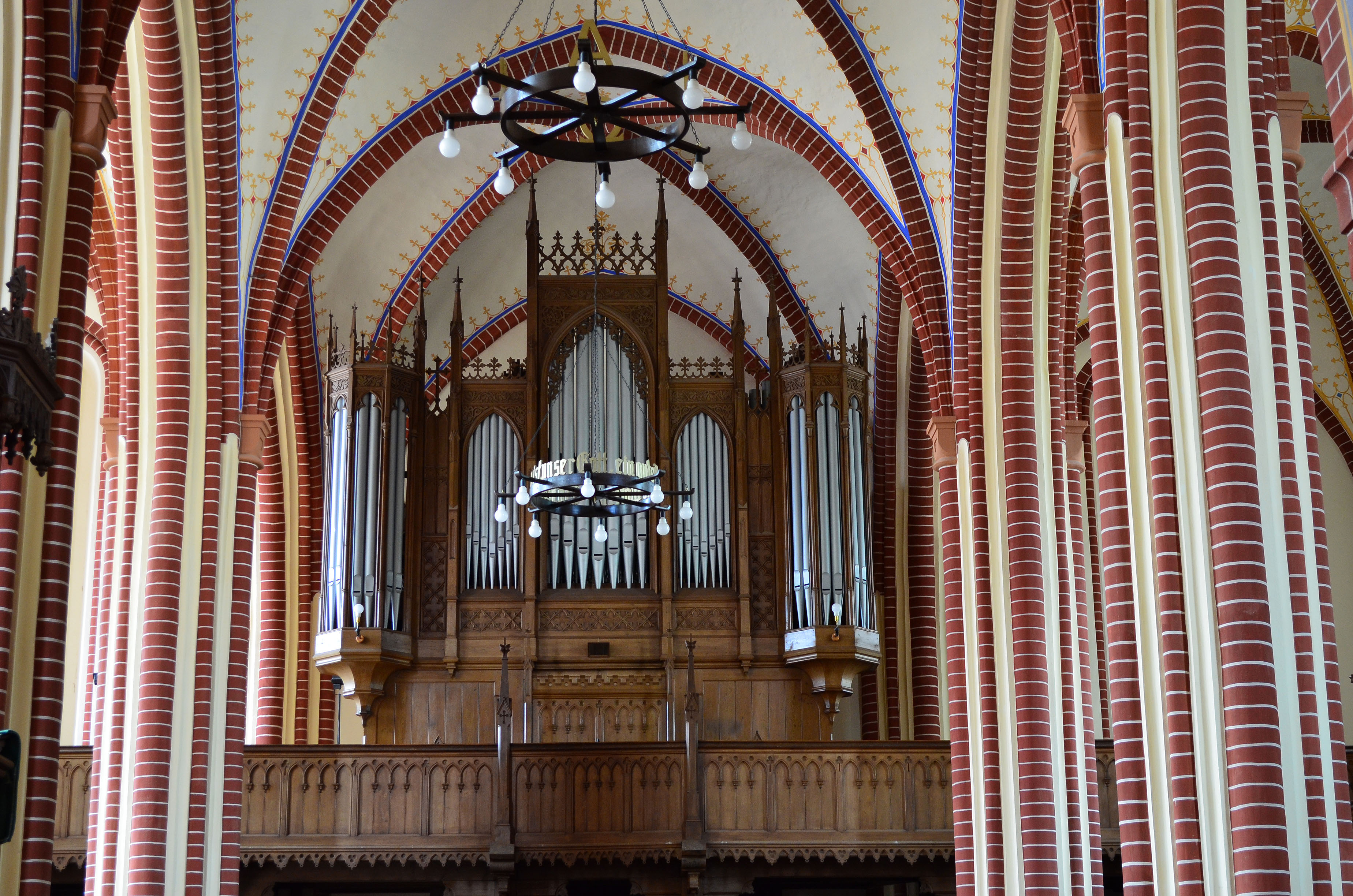 Röbel, Nicolaikirche, Blick vom Altar auf die Orgel